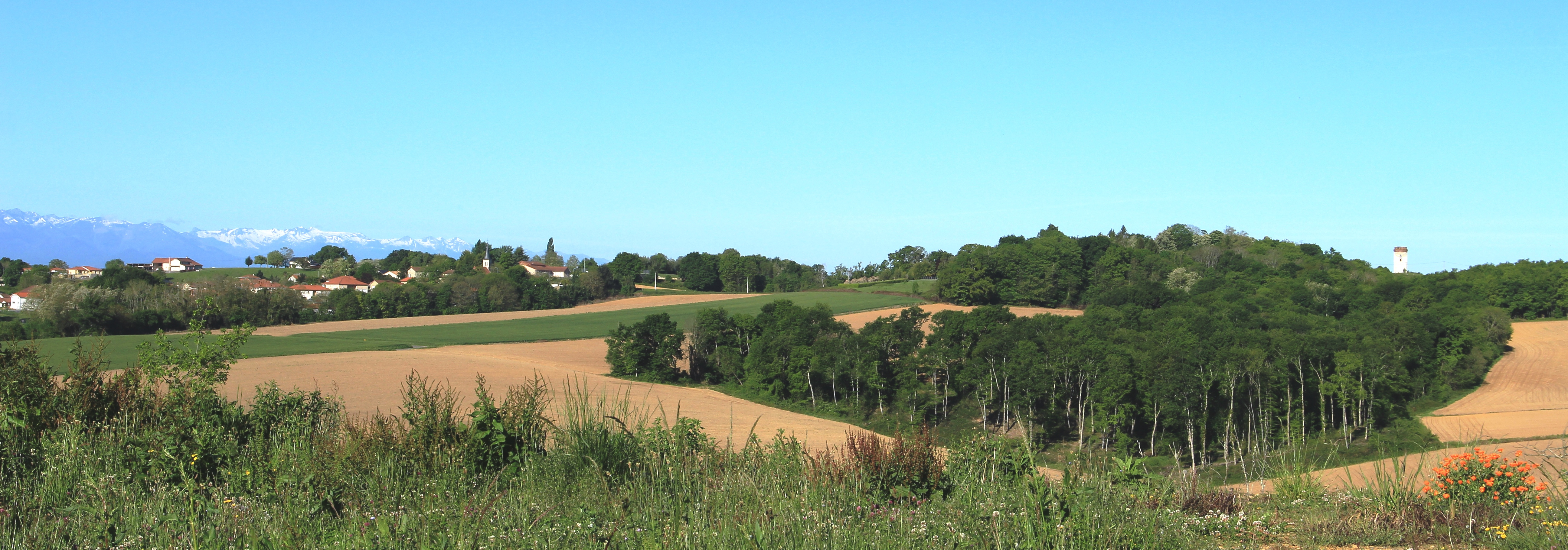 Oléac-Debat (Hautes-Pyrénées)